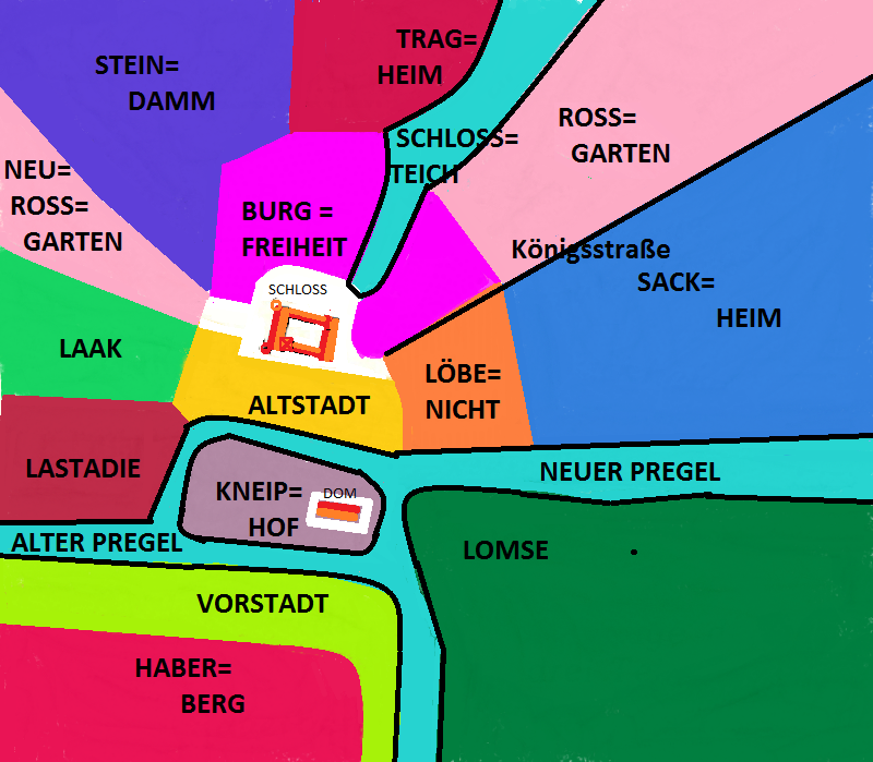 Königsberg, Stadtteile. Eigene Illustration nach verschiedenem Kartenmaterial, meist aus Podehl.